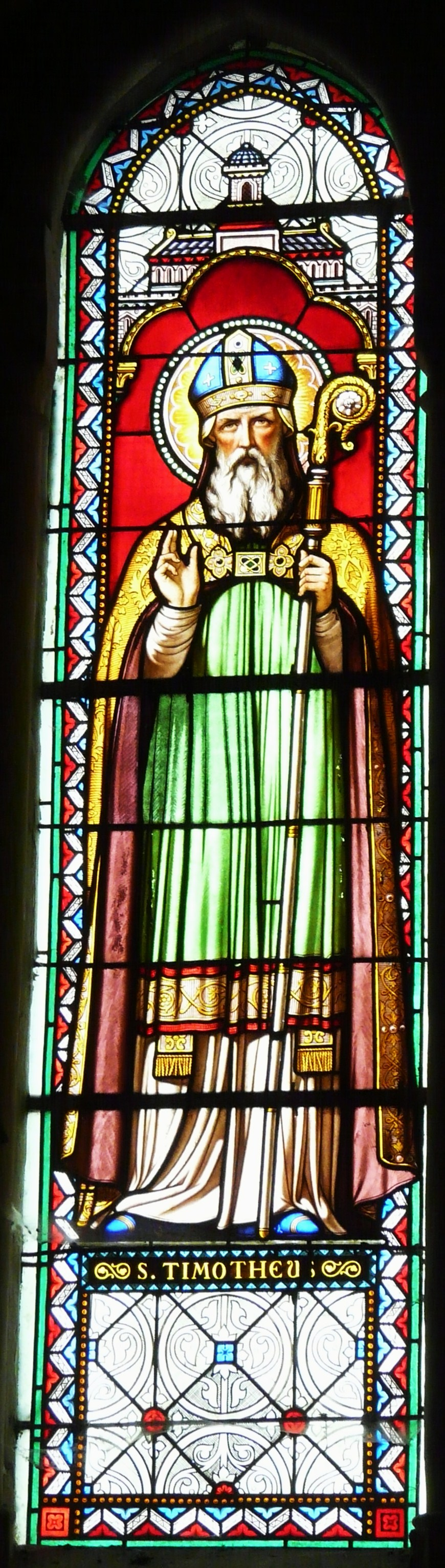 représentation de saint Timothée, vitrail central du chœur de l'église Saint-Timothée, Paussac-et-Saint-Vivien, Dordogne, France.